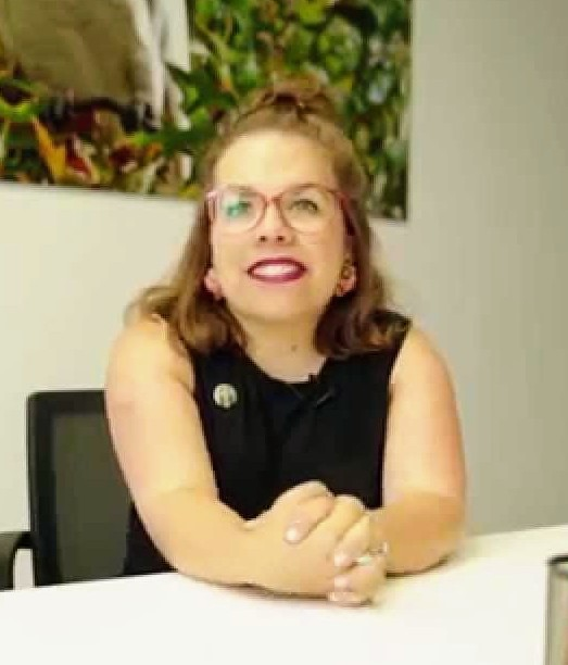 Ninia Binias lebt in Hannover und ist Bloggerin, Poetry Slammerin und Moderatorin. Seit 2015 moderiert Sie ihre eigene TV Show mit dem Namen ”Ninias Fashion Mag” bei dem sie ihre Leidenschaft für Mode und Trends ausleben kann. Darüber hinaus engagiert sich Ninia für Aktion Mensch. Da sie selber kleinwüchsig ist, ist es ihr ein Anliegen zu zeigen, dass sich Kleinwüchsigkeit und Modebewusstsein nicht ausschliessen. Warum man nicht immer darauf hören sollte, was andere so sagen - oder die Geschichte hinter dem Tweet: "Alte Frau schaut mich an und sagt zu ihrem Mann: "Wie sieht die denn aus? †Hahaha." ICH HABE DEN MODEZENIT ERREICHT." Ninias Tweets gibt's unter Alle Folgen gibt's unter oder hier im Channel.